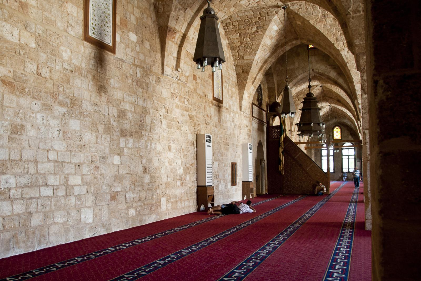 النسجد المنصوري من الداخل